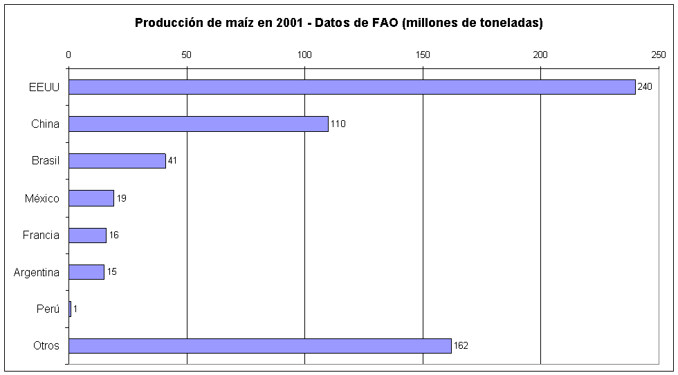 Producción mundial de maíz, ajusto formato de texto.